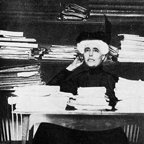 Olga Ossani nella redazione del giornale "La Vita"